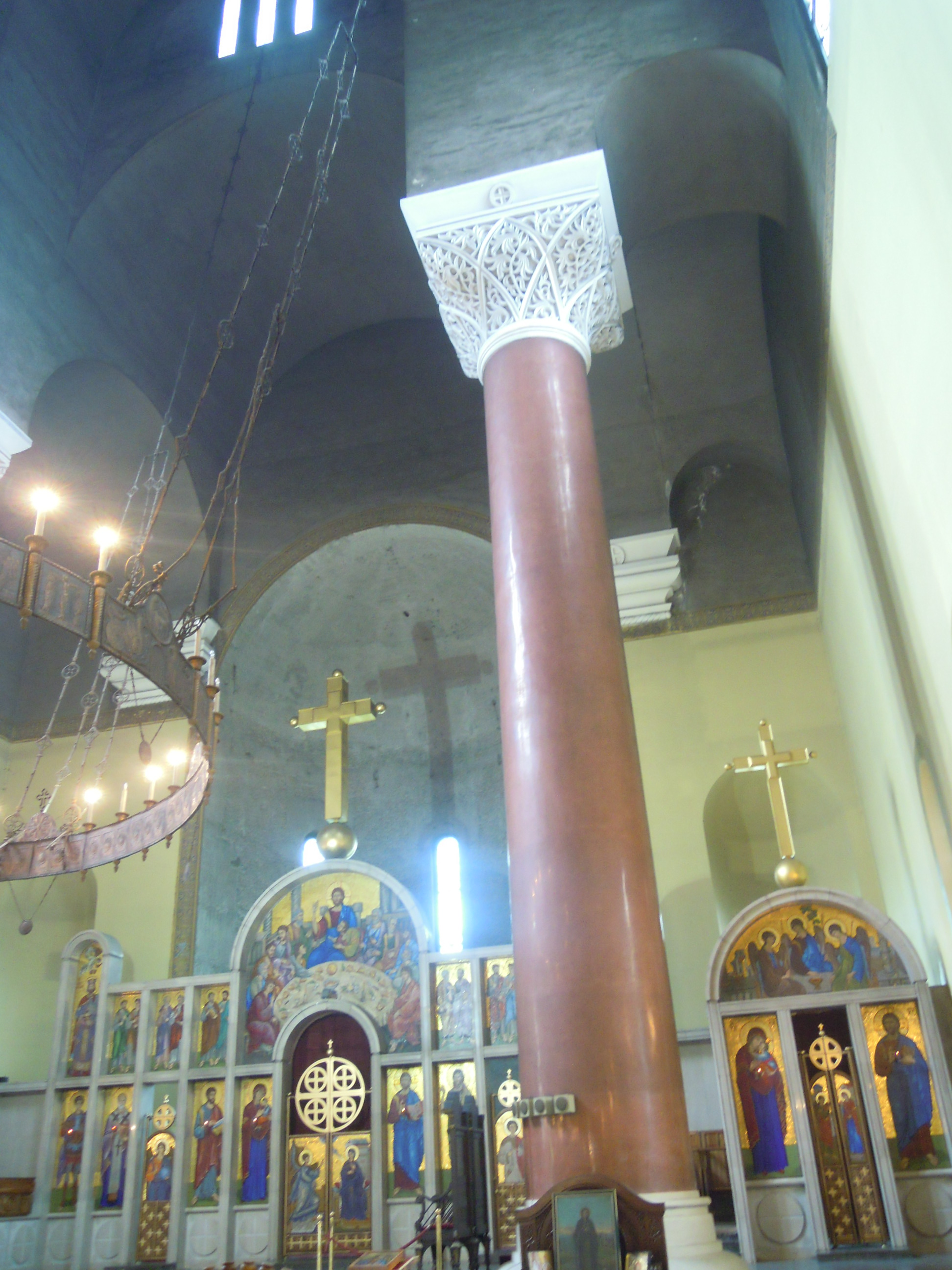 L'interno incompiuto della chiesa di San Marco, in Belgrado. L'iconostasi marmorea con icone musive divide il presbiterio con l'altare dalla parte riservata al coro e all'assemblea.